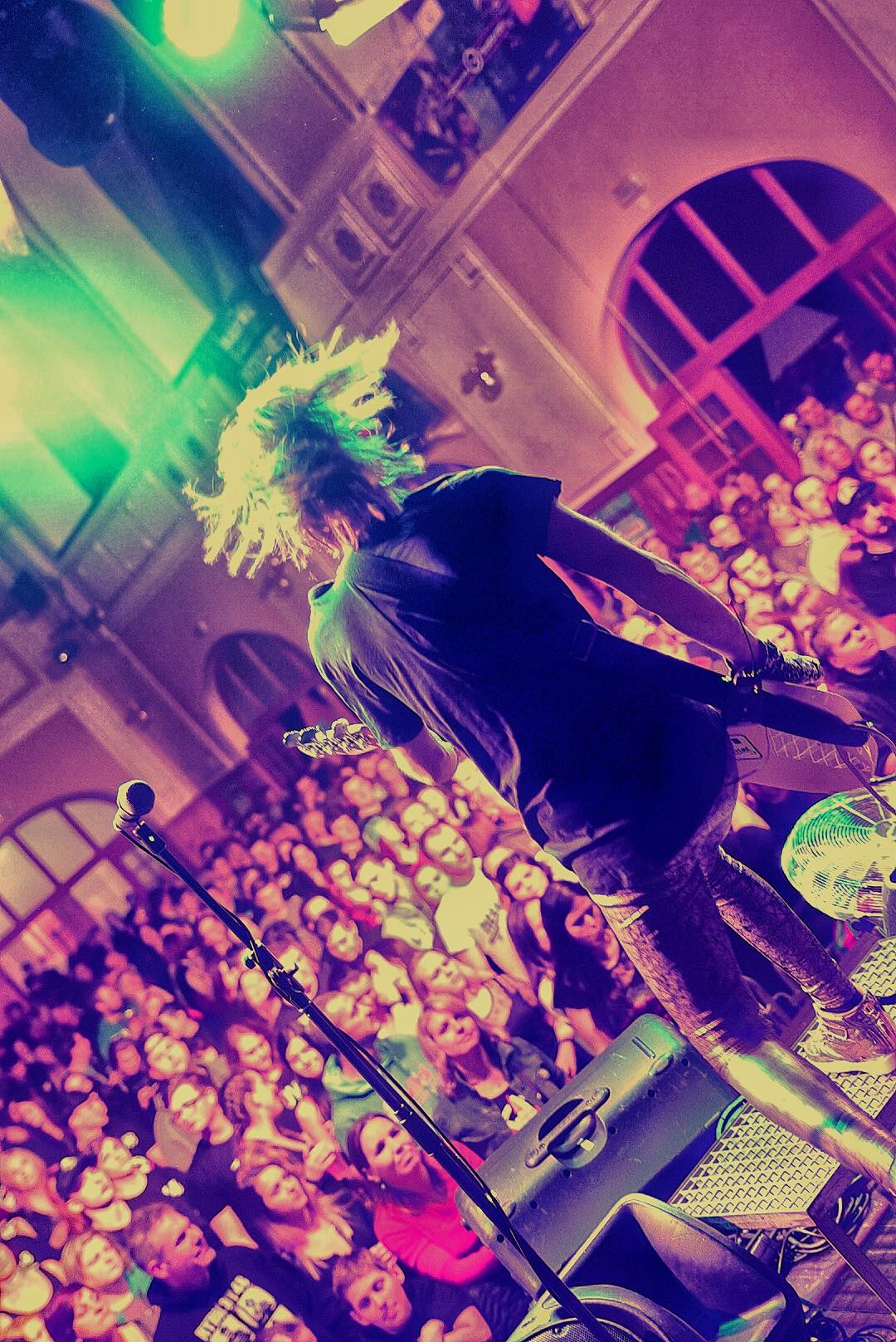 Pepča - foto z koncertu